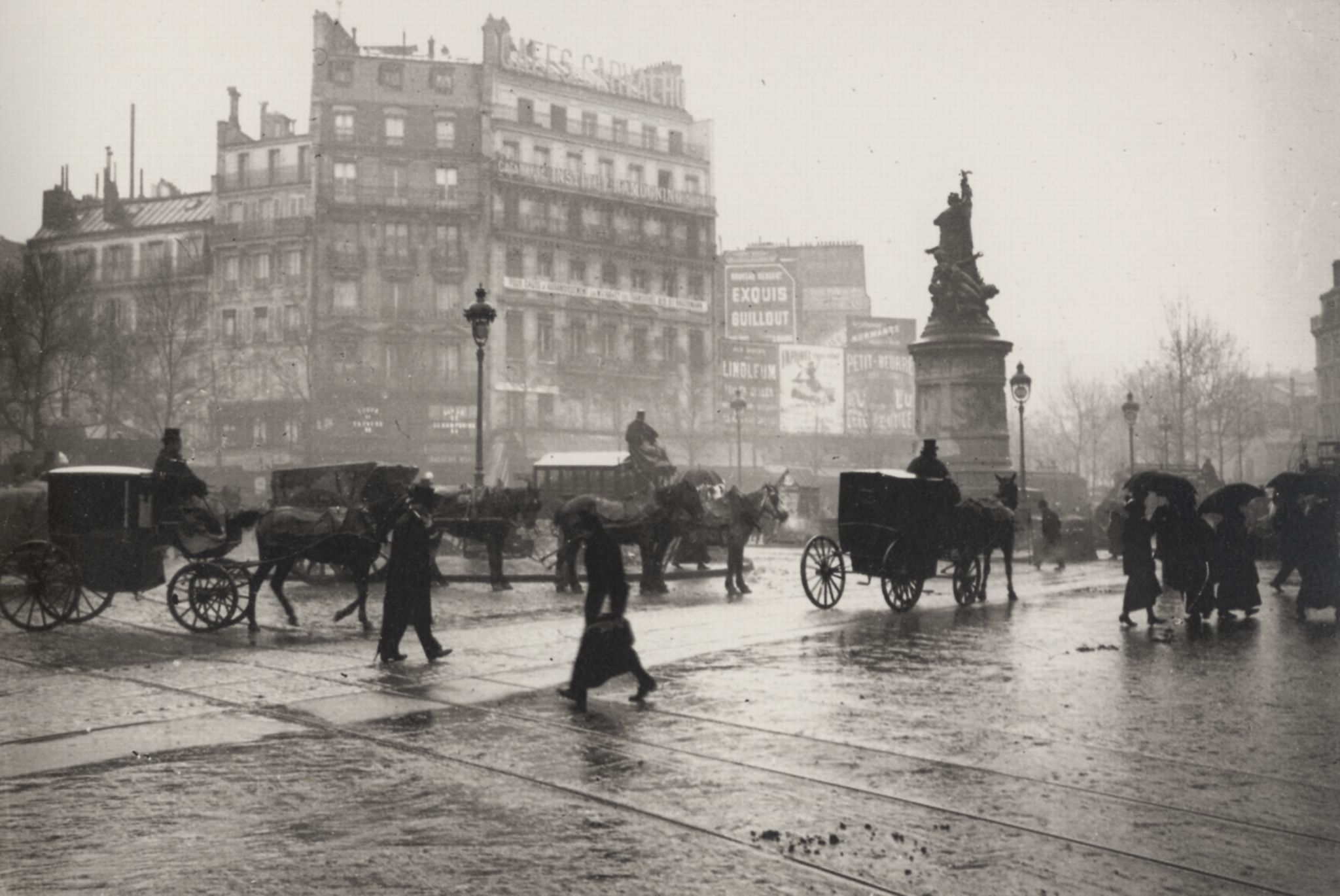 Zola, Francois Emile: Place Clichy, von der Rue d'Amsterdam aus aufgenommen